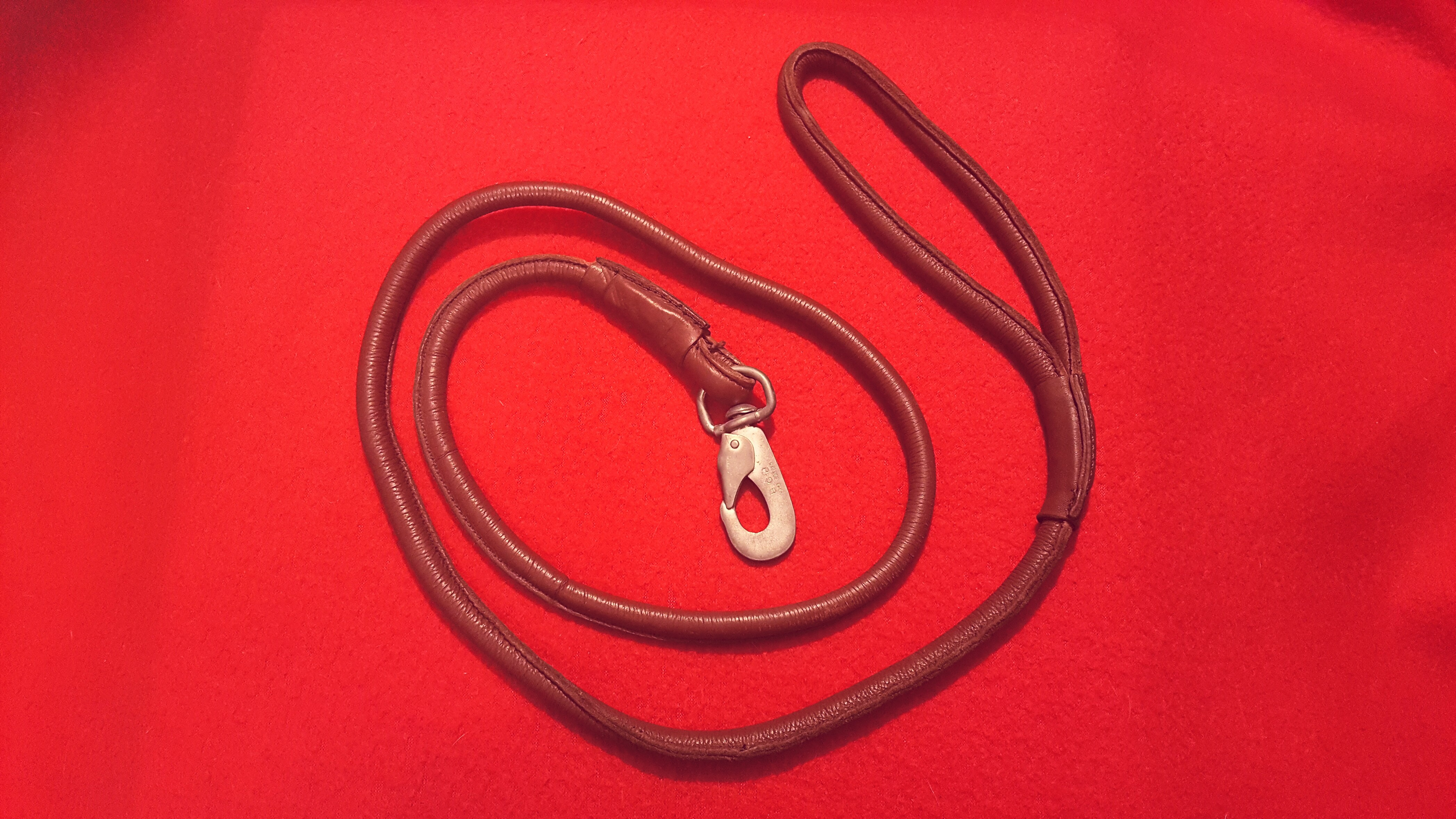 Punasel foonil nahast koera jalutusrihm